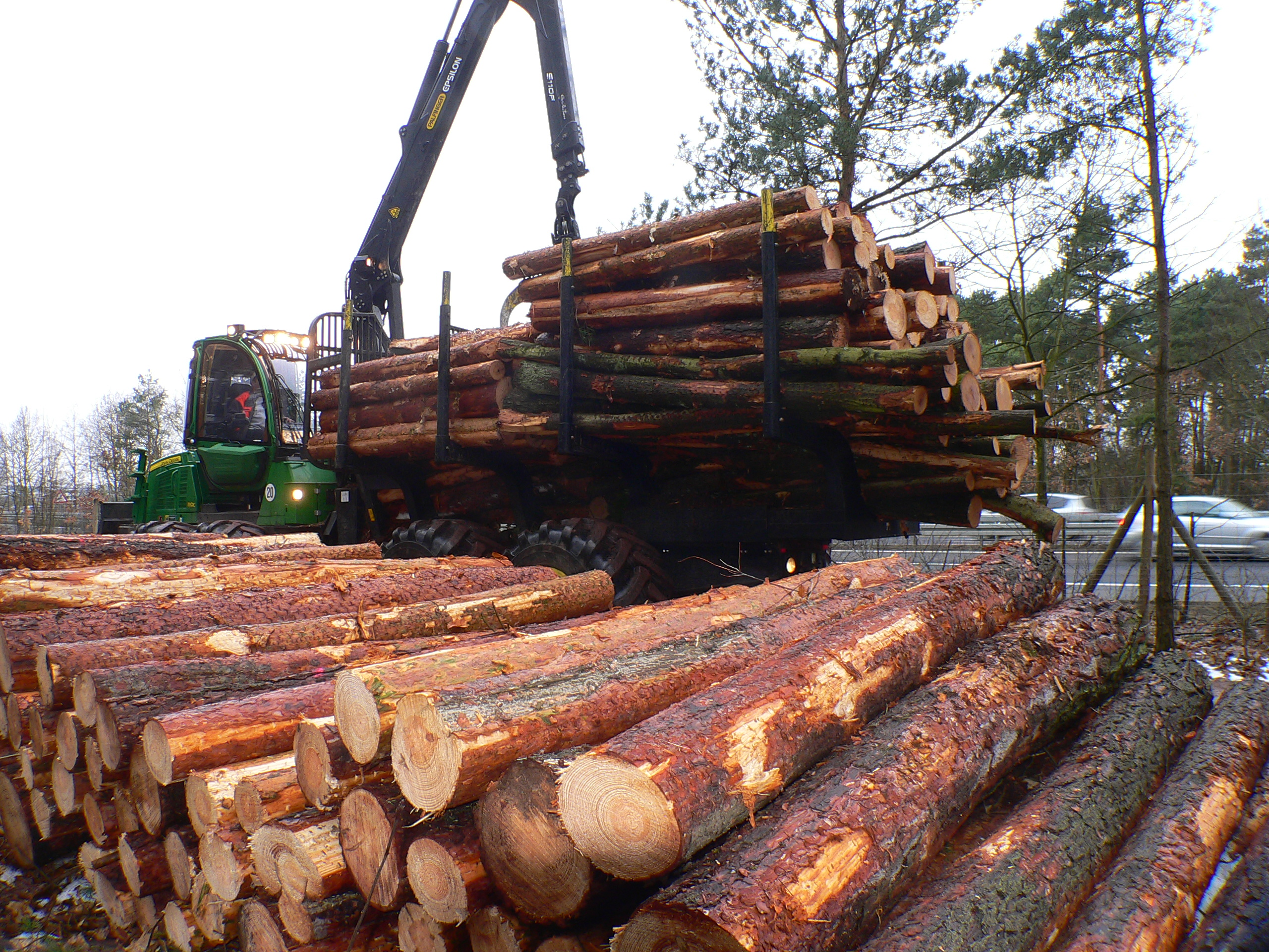 de: Forwarder (Rückezug) 1170E von John Deere.